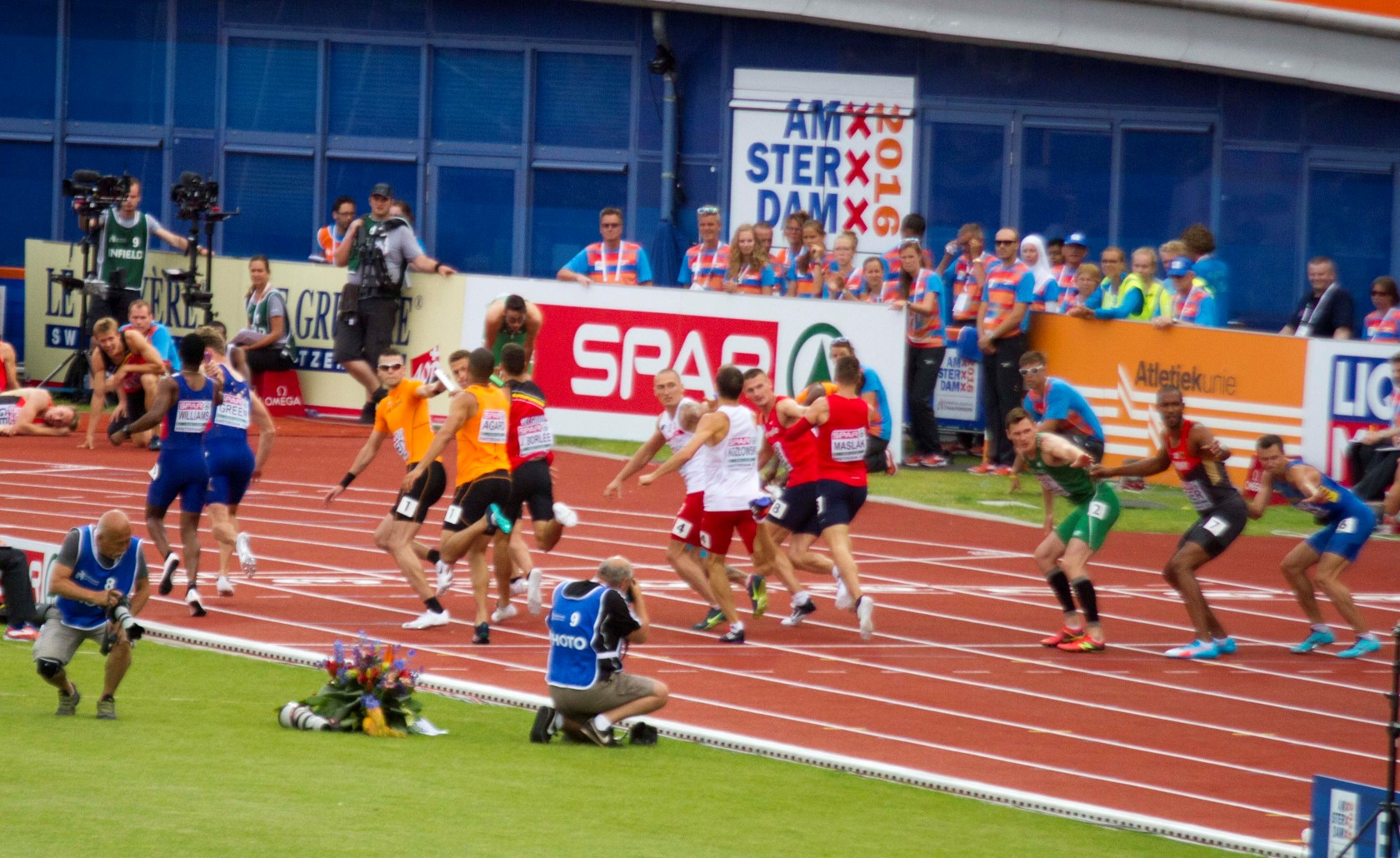 final race / finale